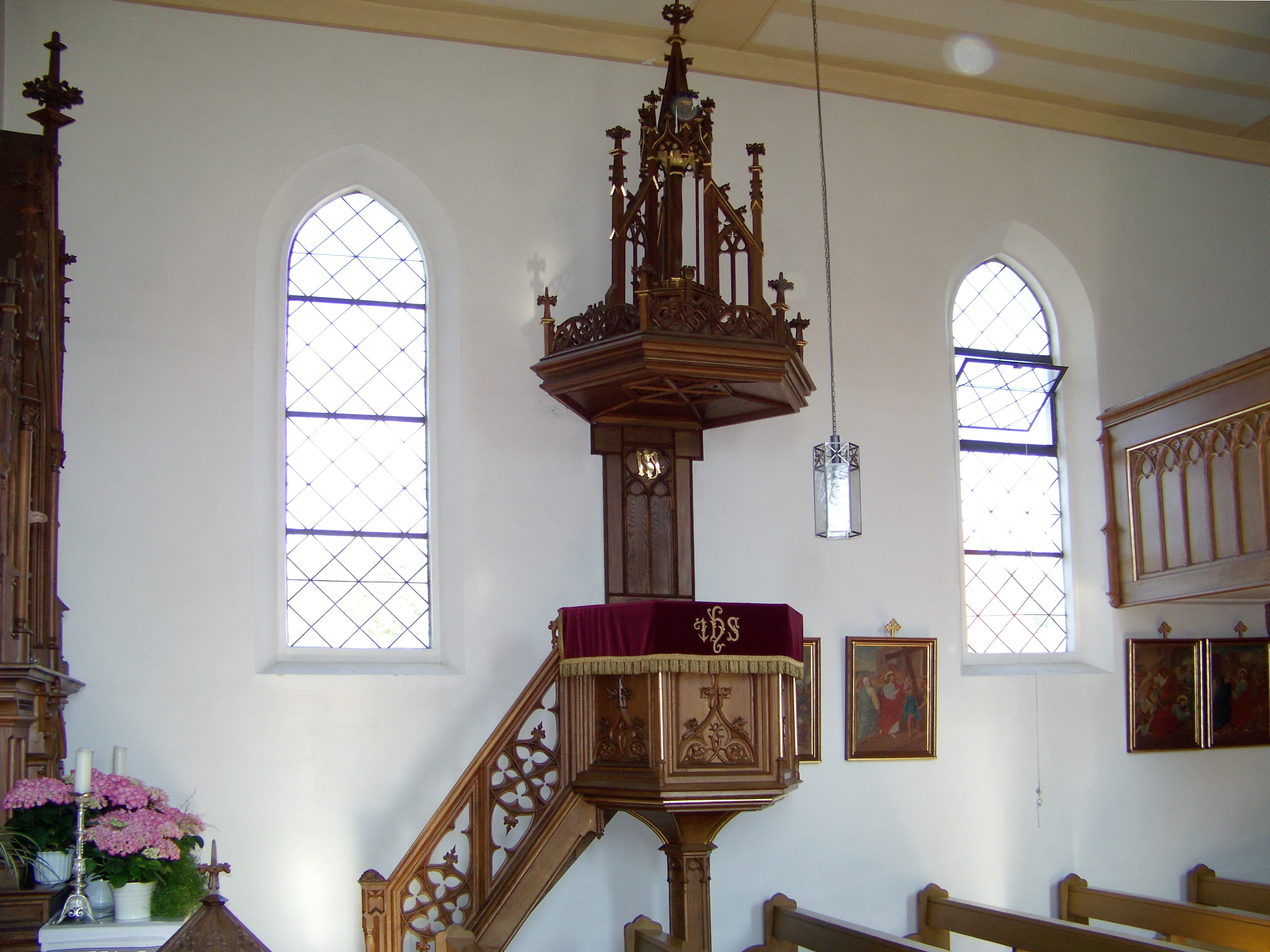 Laberweinting, Franken 13, katholische Expositurkirche St. Nikolaus. Polygone Kanzel an der Ostwand des Langhauses.